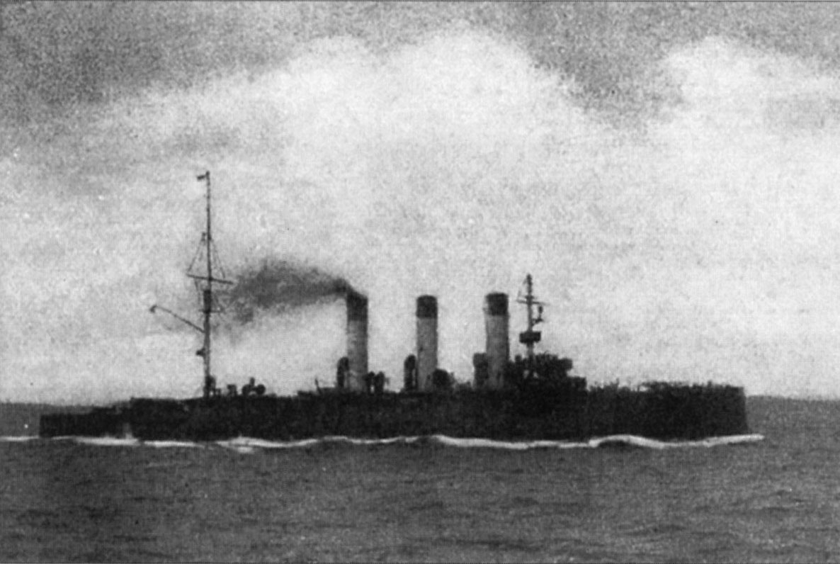 Крейсер 1-го ранга "Аврора", фотография с борта крейсера "Олег", 15 мая 1905 года